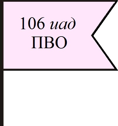 Знак истребительной авиационной дивизии ПВО на оперативно-тактическую карту